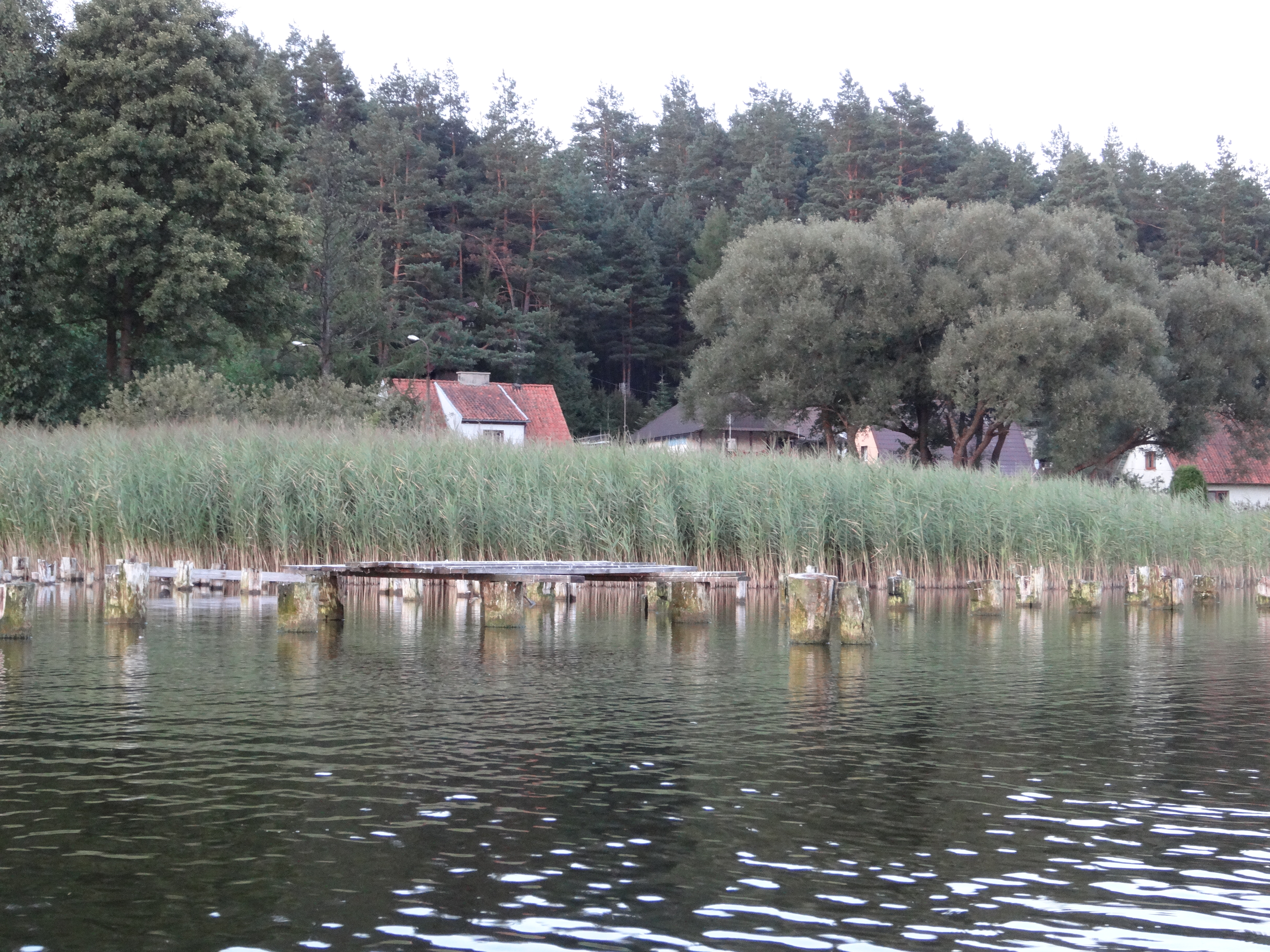 Zgon - Jezioro Mokre na Pojezierzu Mrągowskim